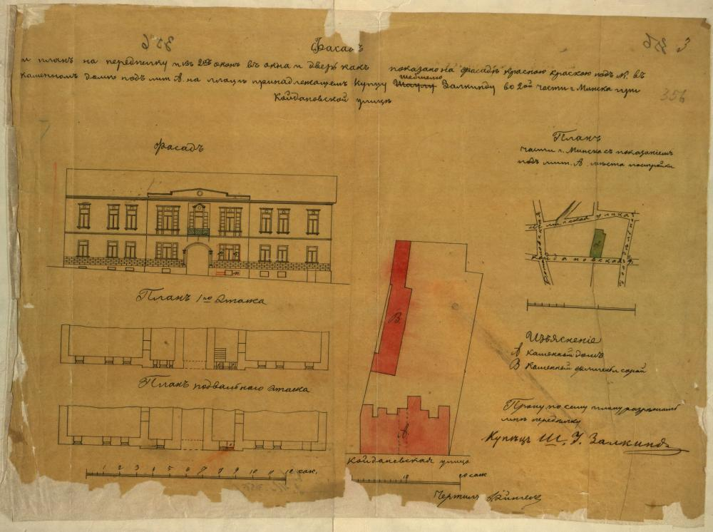 Беларуская (тарашкевіца): Менск (Miensk), вуліца Койданаўская (vulica Kojdanaŭskaja)